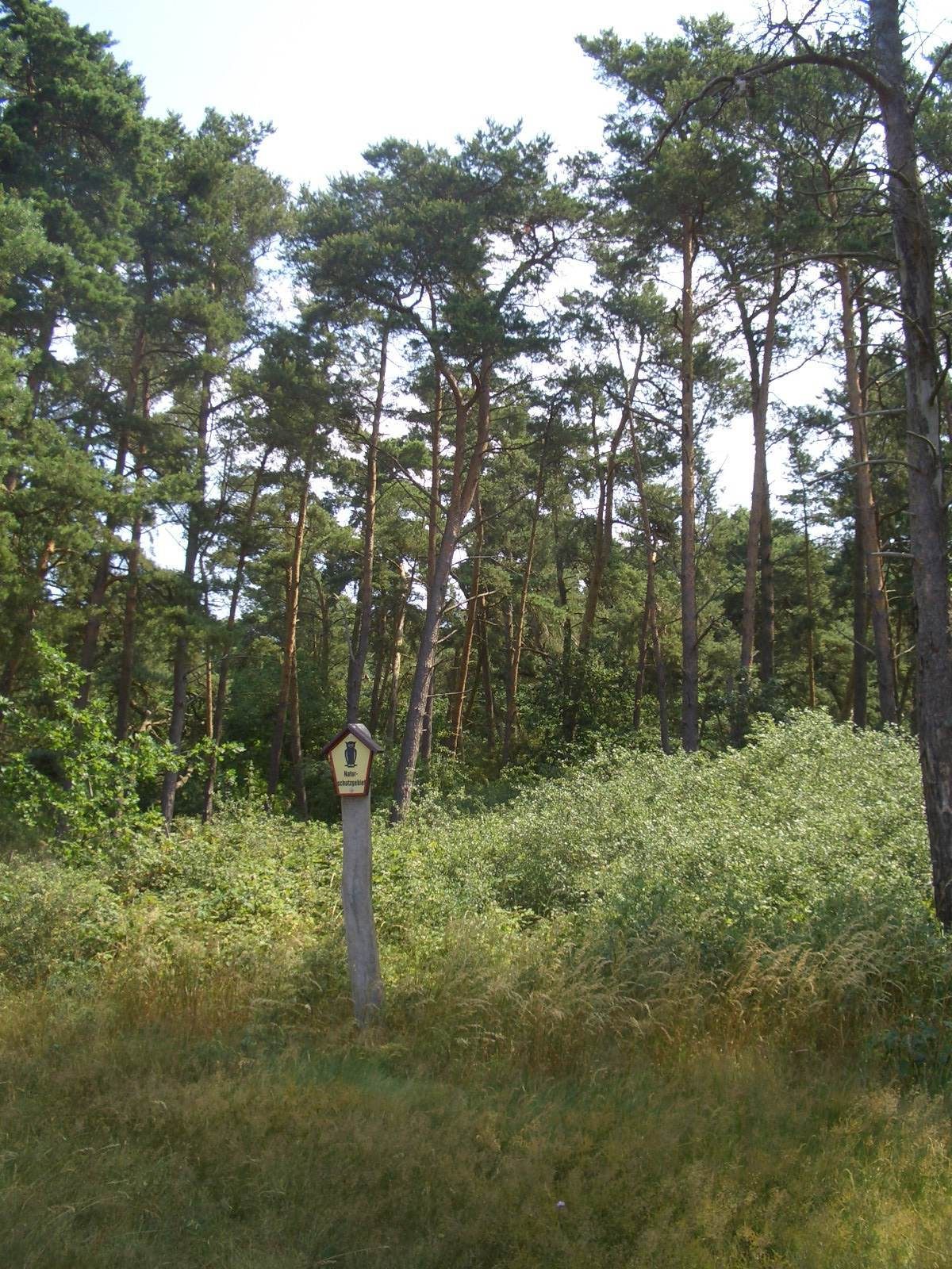 Strandwall. Naturschutzgebiet Lanken.